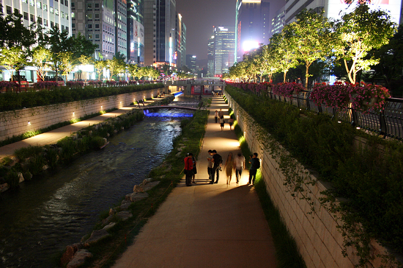 Cheonggyecheon at Jonggak in Seoul at night